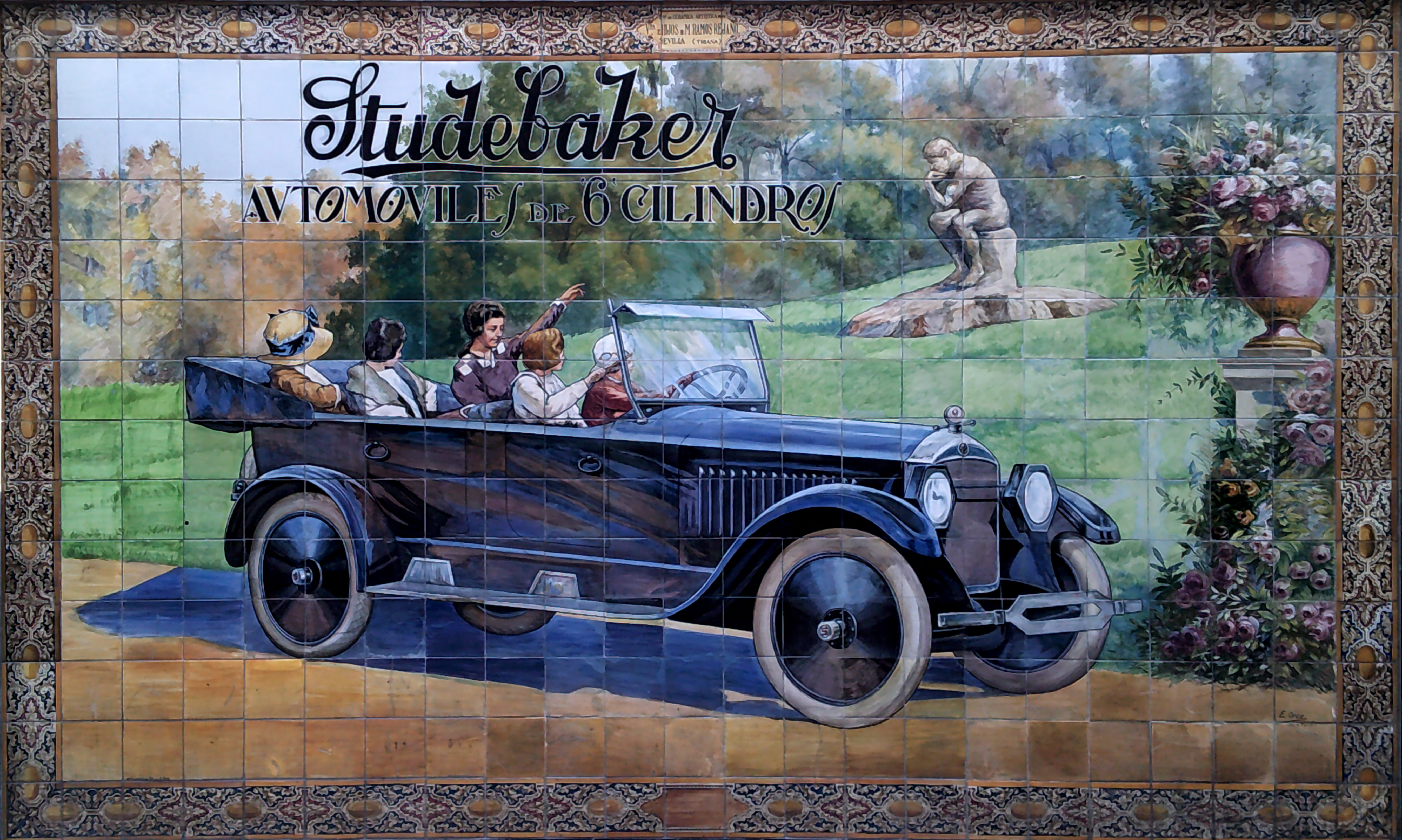 Anuncio de Studebaker. Calle Tetuán. Sevilla, Andalucía, España.